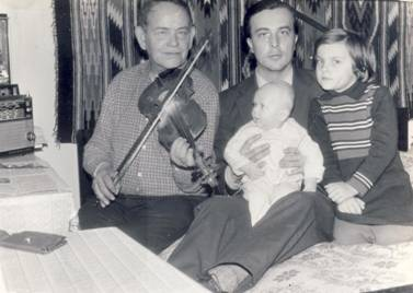 Музикант Василь Грималюк (Могур), краєзнавець та науковець Іван Зеленчук із дочкою Оксаною і сином Ярославам у Криворівні